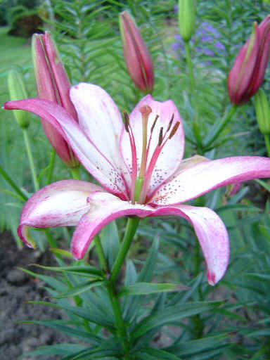 Lilium Hybrid 'Sorbet' - asian hybrid